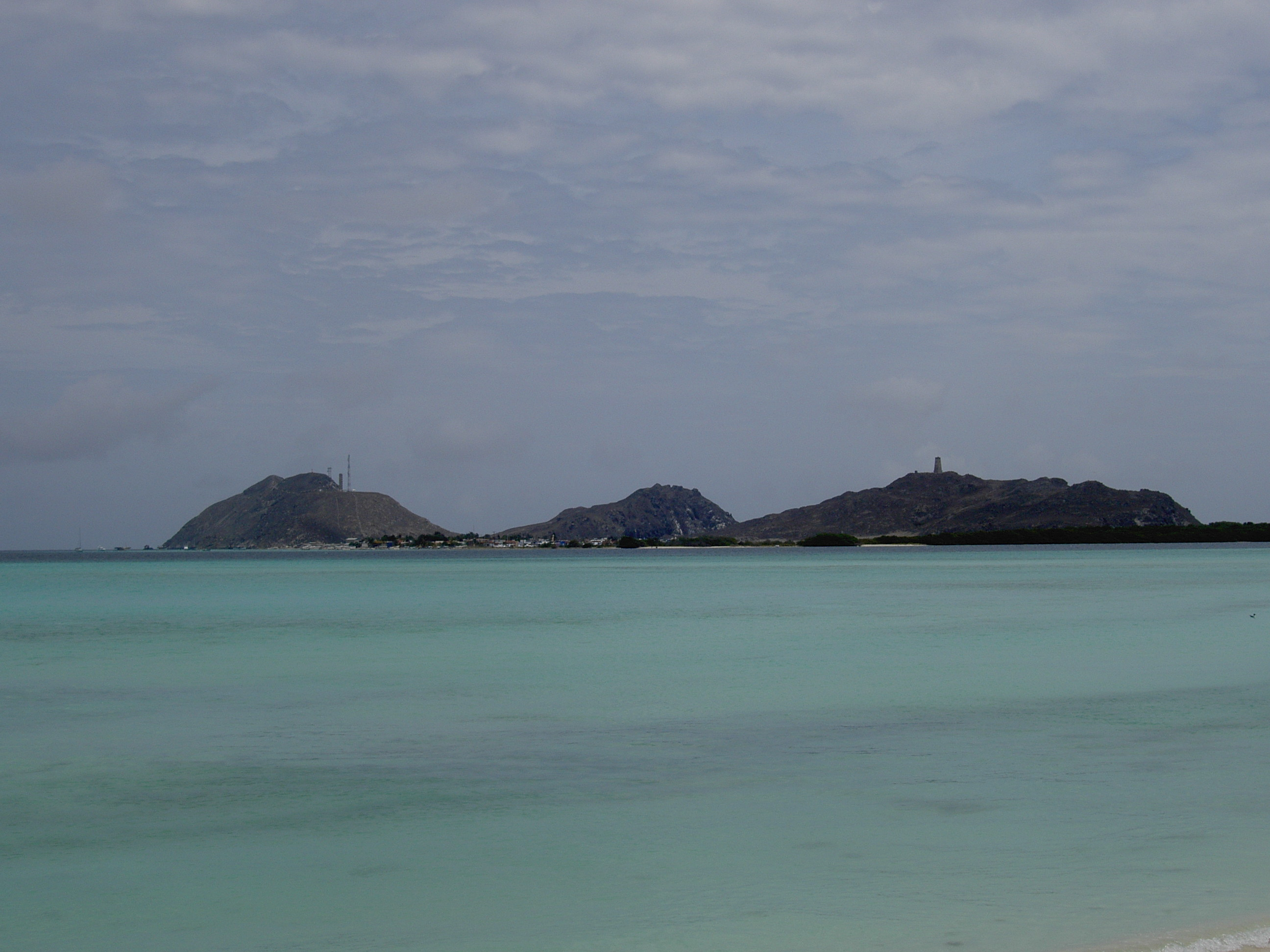 Foto del Gran Roque desde Cayo Madrizquí mirando al NW. Autor: Pedro Sánchez (PSE)